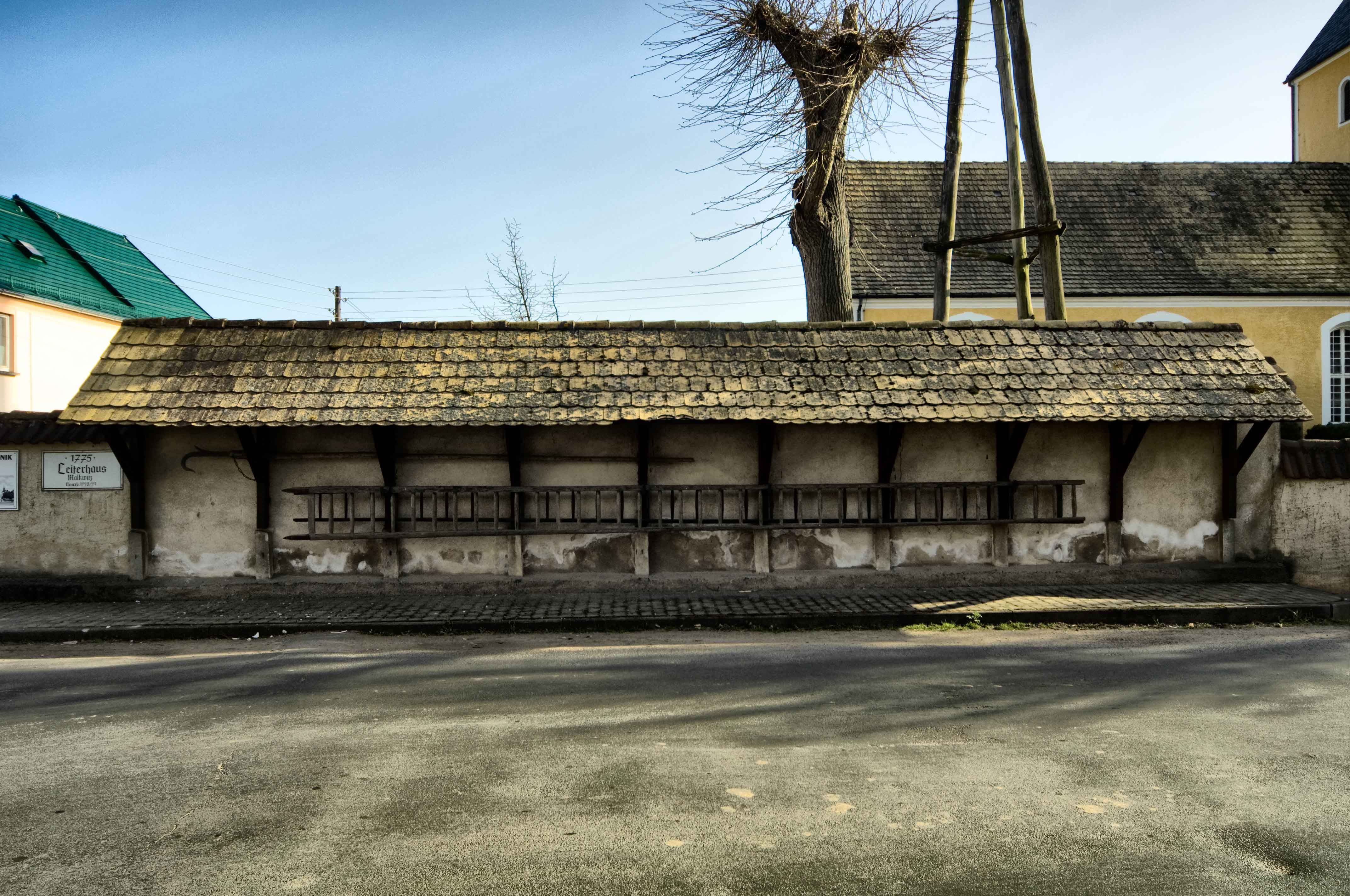 Das Leiterhaus von Malkwitz, Ortsteil von Wermsdorf in Sachsen, Stephan Komp